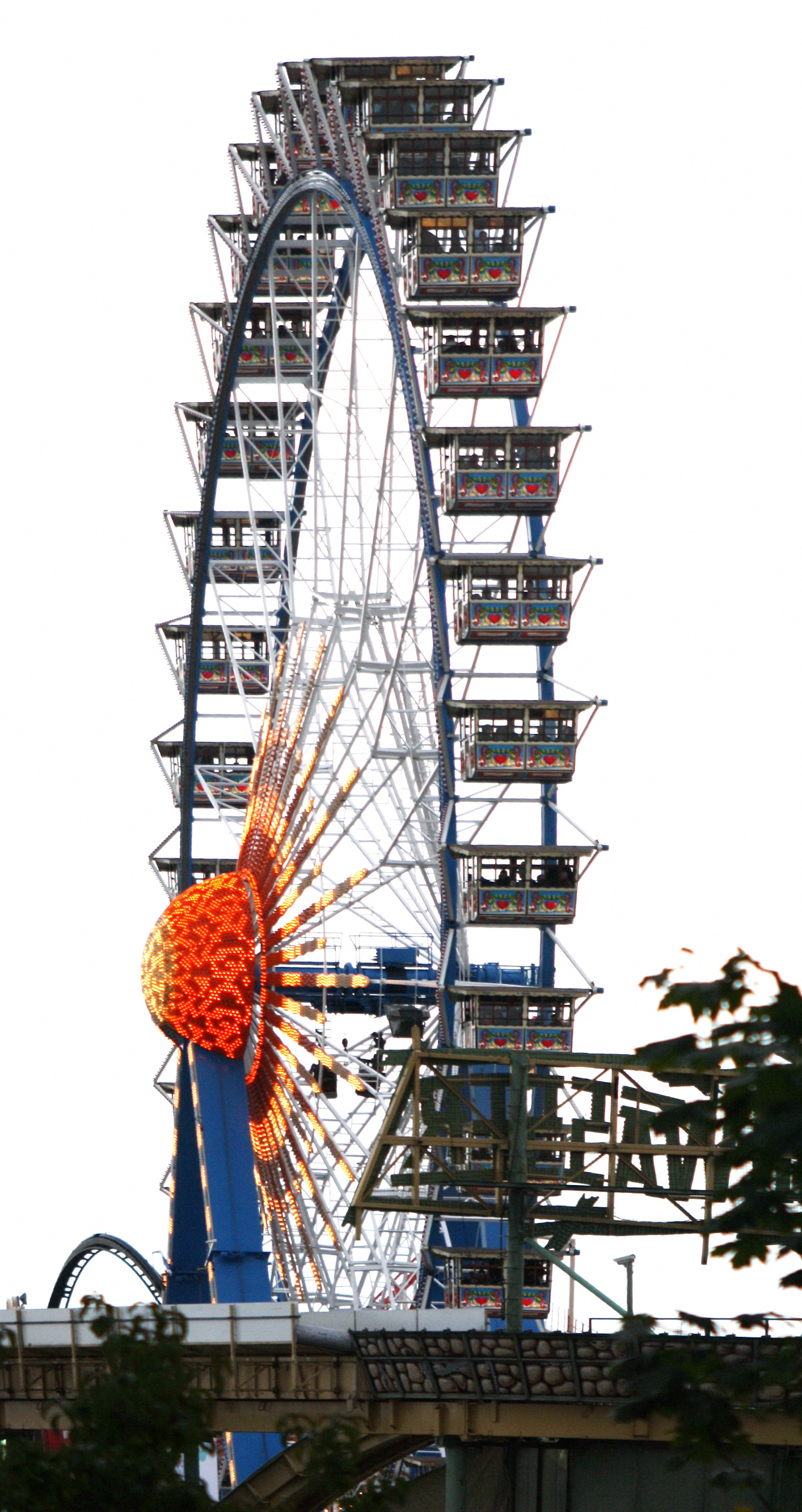 Riesenrad am Oktoberfest.